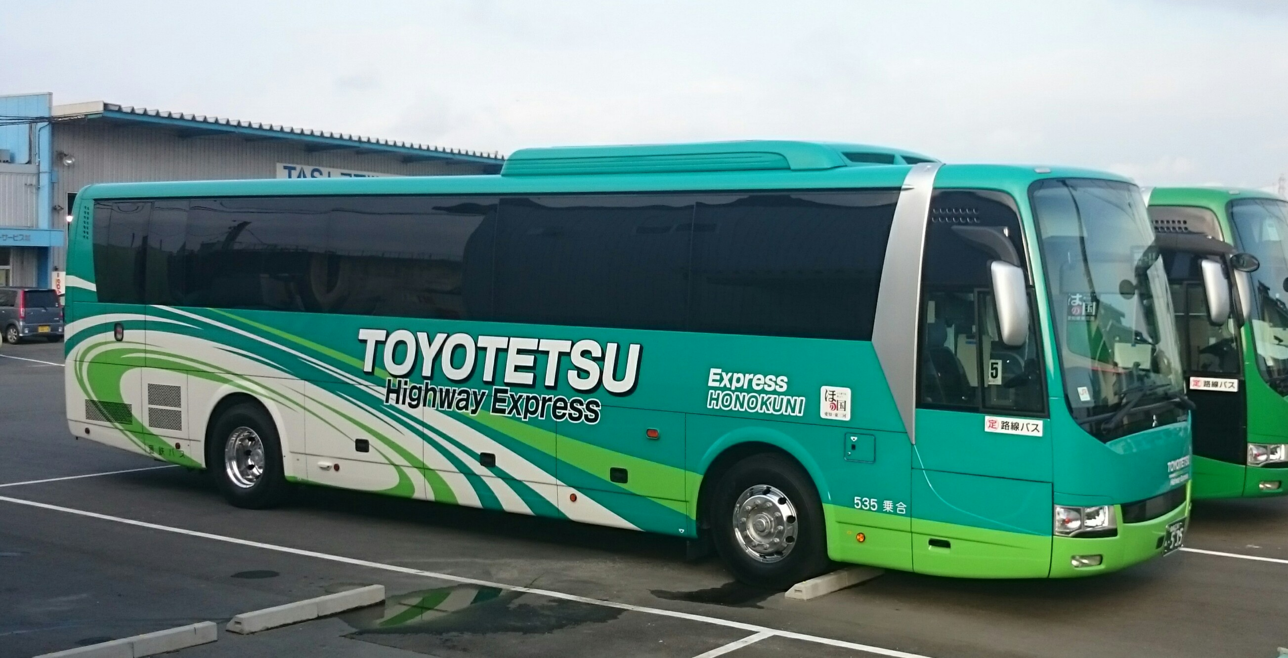 豊鉄バスの新宿豊橋線用車両 （豊鉄バス豊橋営業所敷地外より撮影）